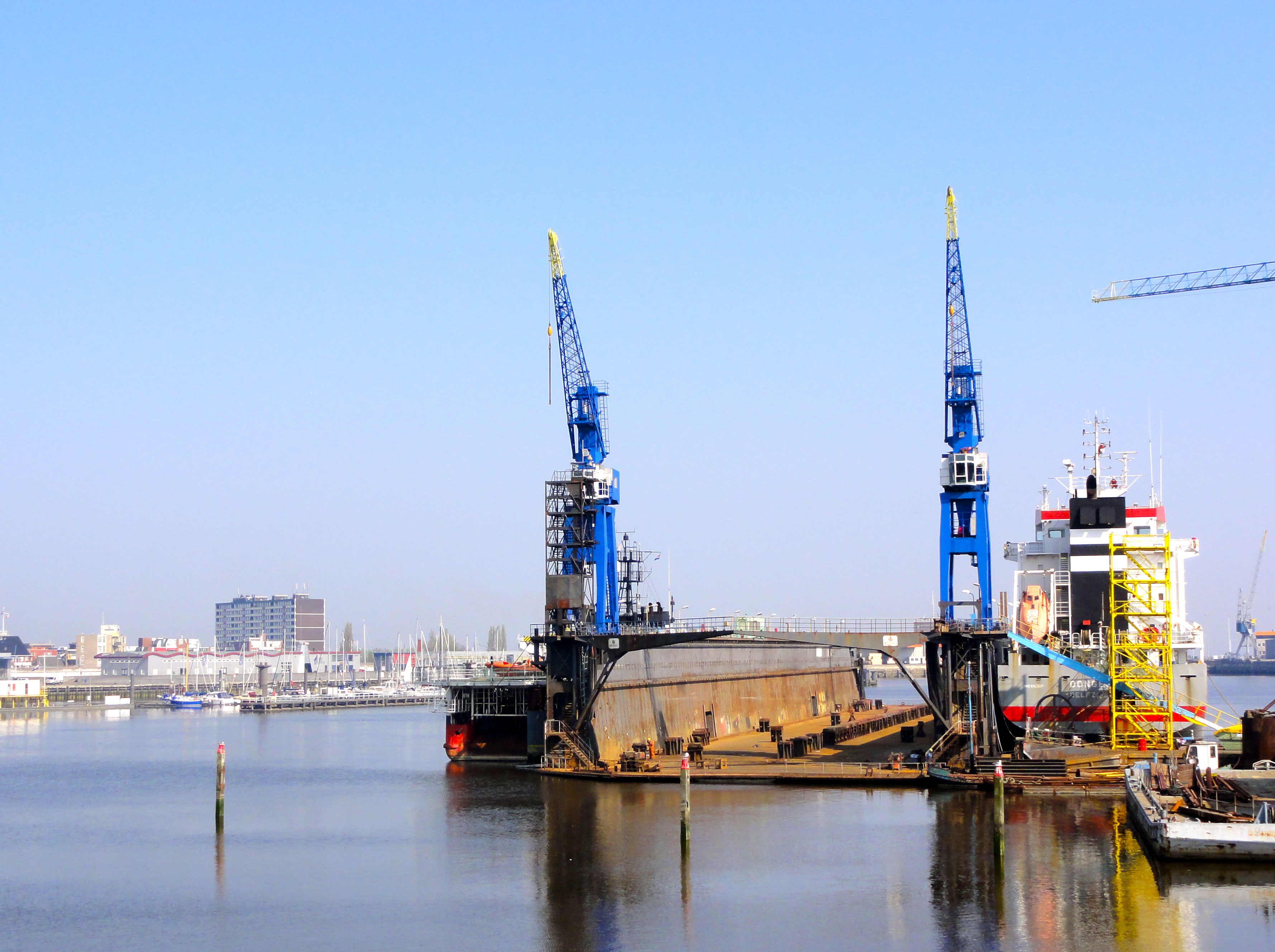 De haven van Delfzijl